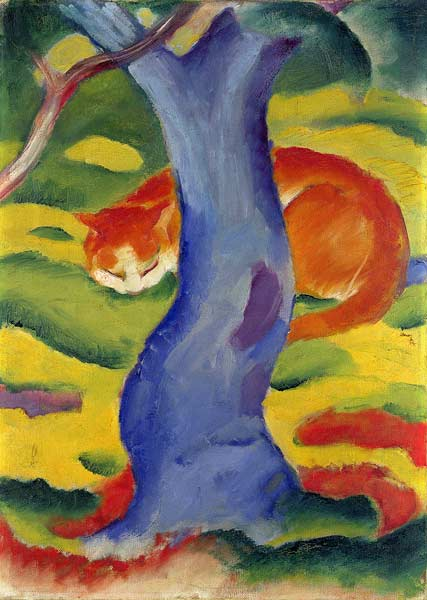 Katze hinter einem Baum (Kinderbild)Cat behind a treetitle QS:P1476,de:"Katze hinter einem Baum (Kinderbild)" label QS:Lde,"Katze hinter einem Baum (Kinderbild)"